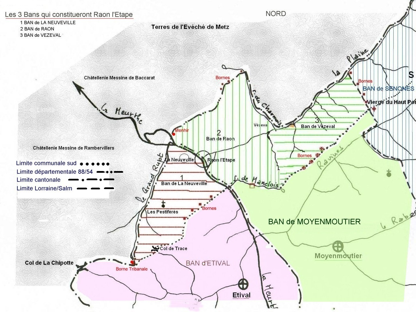 Carte schématique des Bans de Raon et La Neuveille